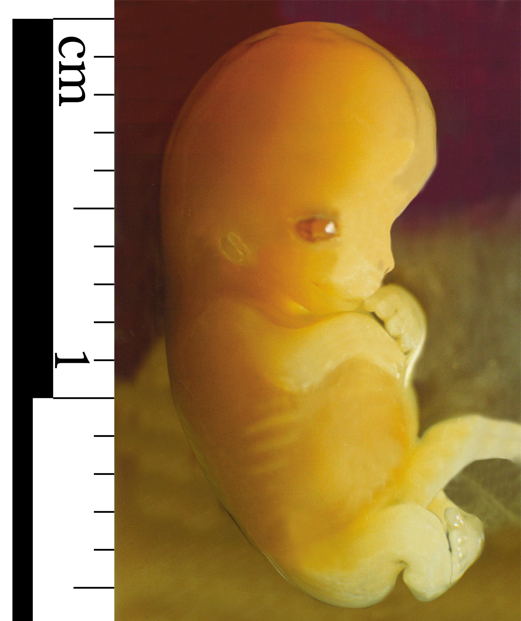 Embryo 7 weeks after conception Fotografiert unter Aufsicht von: Professor Andrzej Skawina of Collegium Medicum Jagiellonian University, Krakow, Poland and Antoni Marsinek, MD of The Czerwiakowski Gynecological and Obstetrics Hospital, Krakow, Poland Fotografen: Andrzej Zachwieja and Jan Walczewski Zur Veröffentlichungs-Lizenz: In einer e-mail Anfrage wurde dem Life Issues Institute die GNU FDL ausführlich erläutert. In der Antwort e-mail vom 10. 4. 2006 erklärte Andrew Mellish für das Life Issues Institute ausdrücklich das Einverständnis mit der Publizierung des Bildes. This work is free and may be used by anyone for any purpose. If you wish to use this content, you do not need to request permission as long as you follow any licensing requirements mentioned on this page.